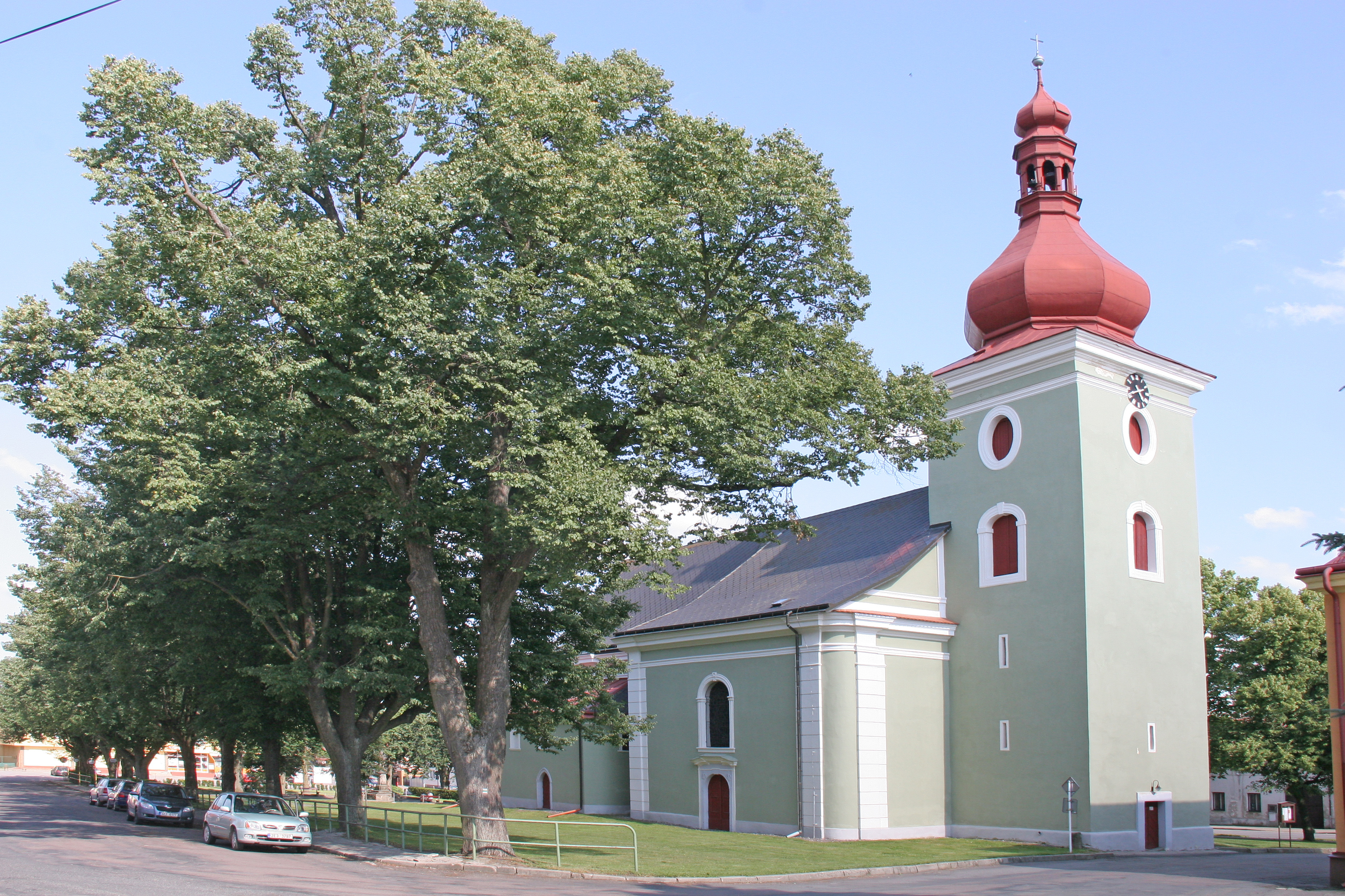 Kostel sv. Vavřince (Seč), nám., Seč